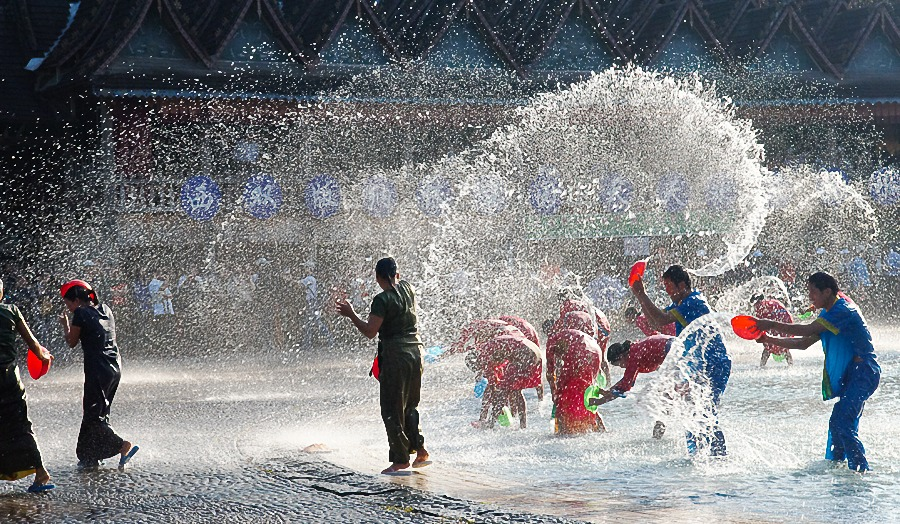 泼水节